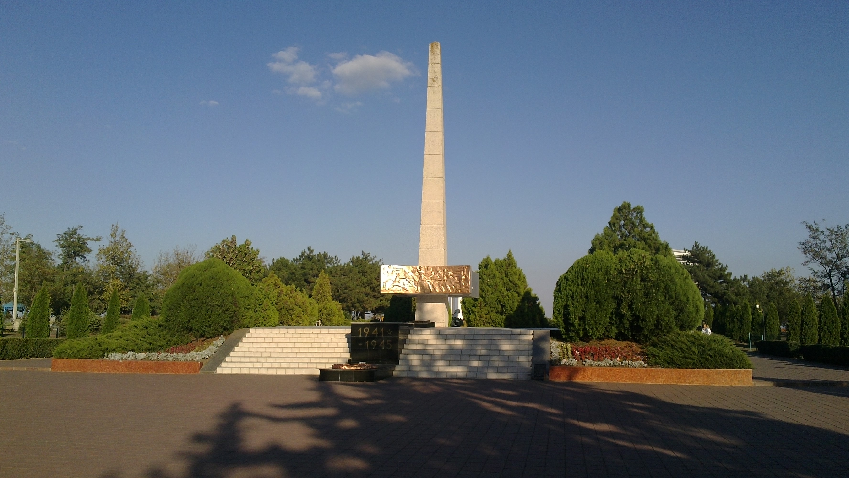 Братська могила 27 радянських воїнів, загиблих при обороні та звільненні Одеси, Іллічівськ, Комсомольський парк